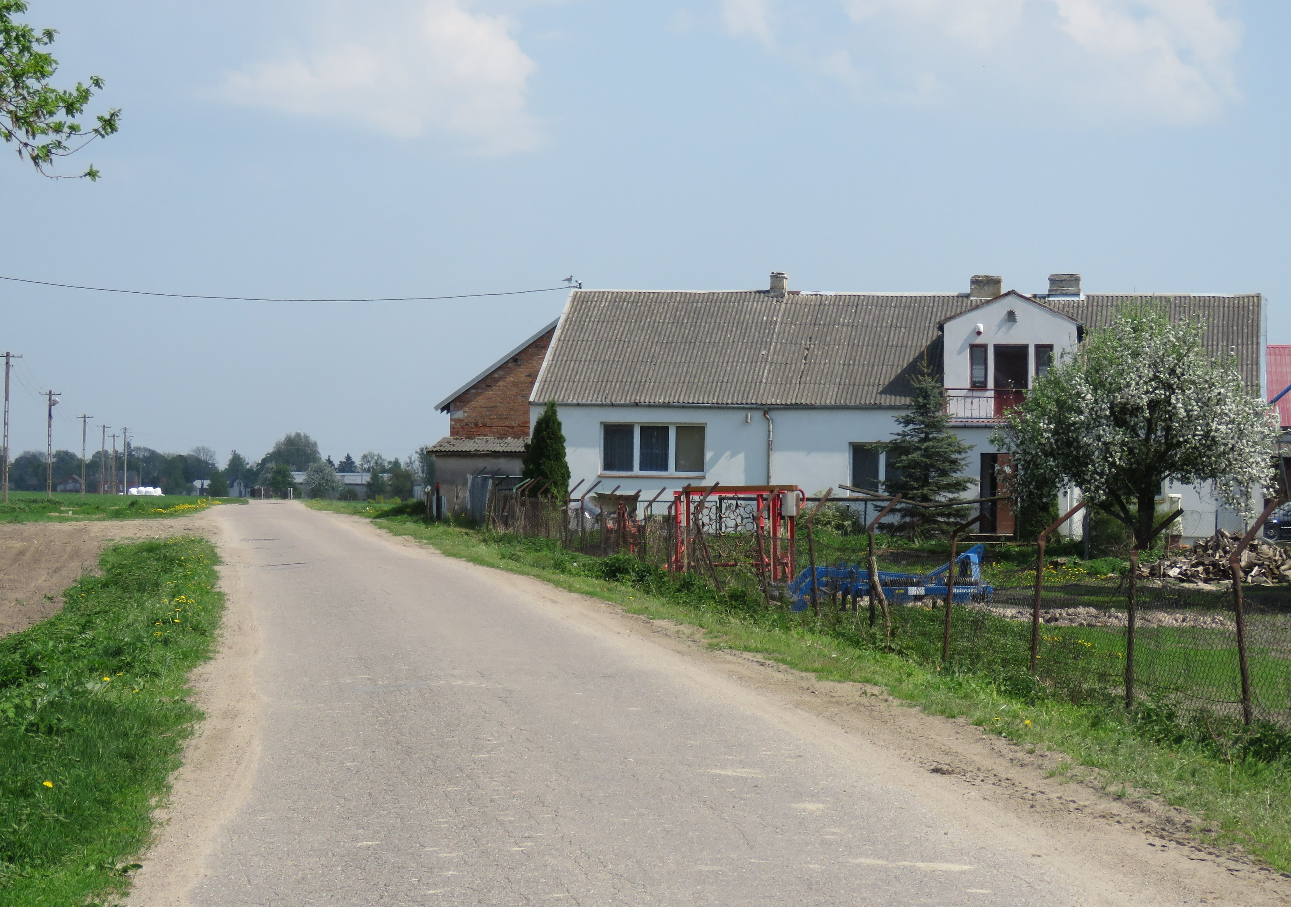 Kozłówko